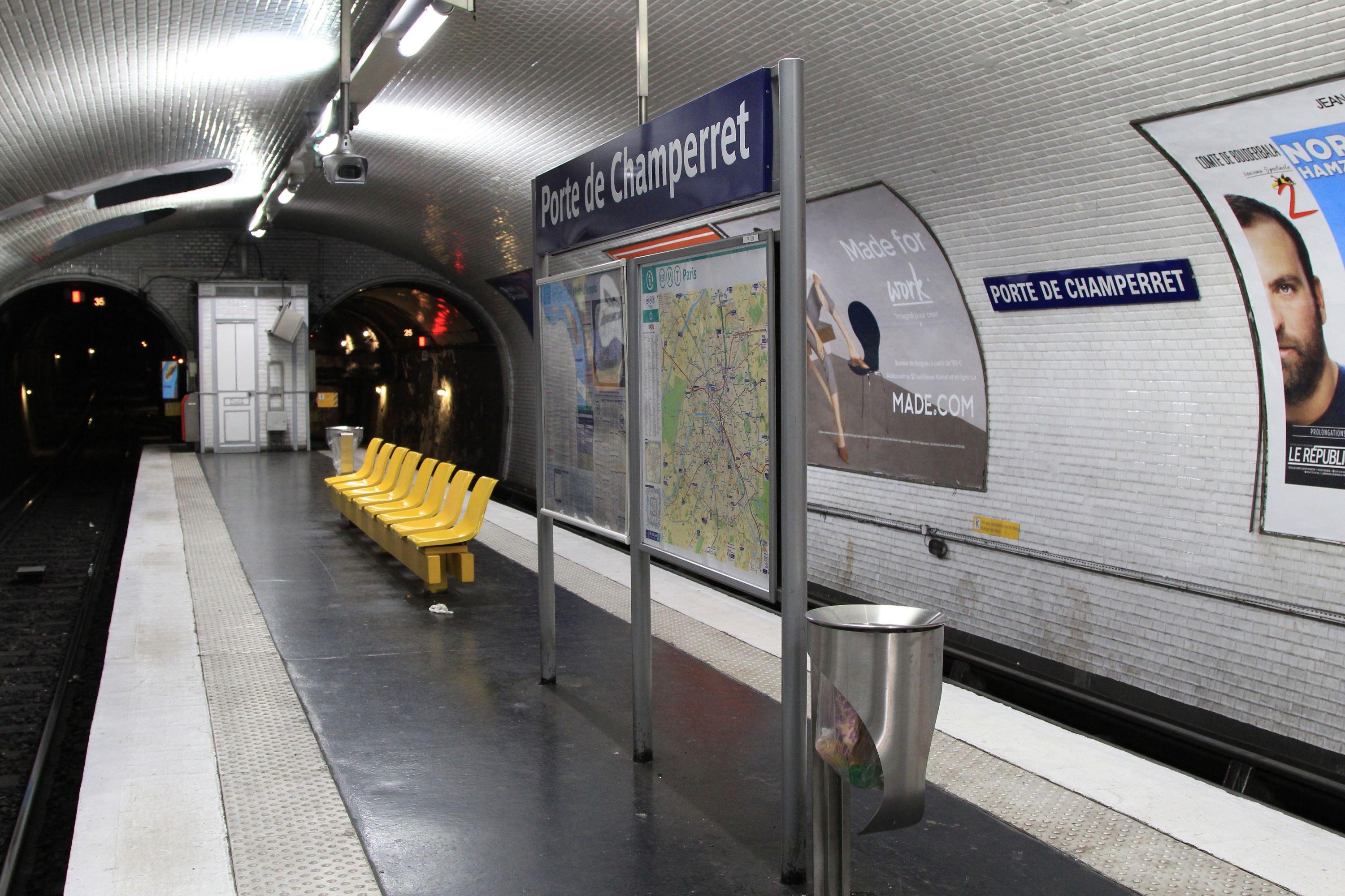 Quai direction Gallieni de la station Porte de Champerret sur la ligne 3 du métro de Paris, vue en direction de Gallieni.